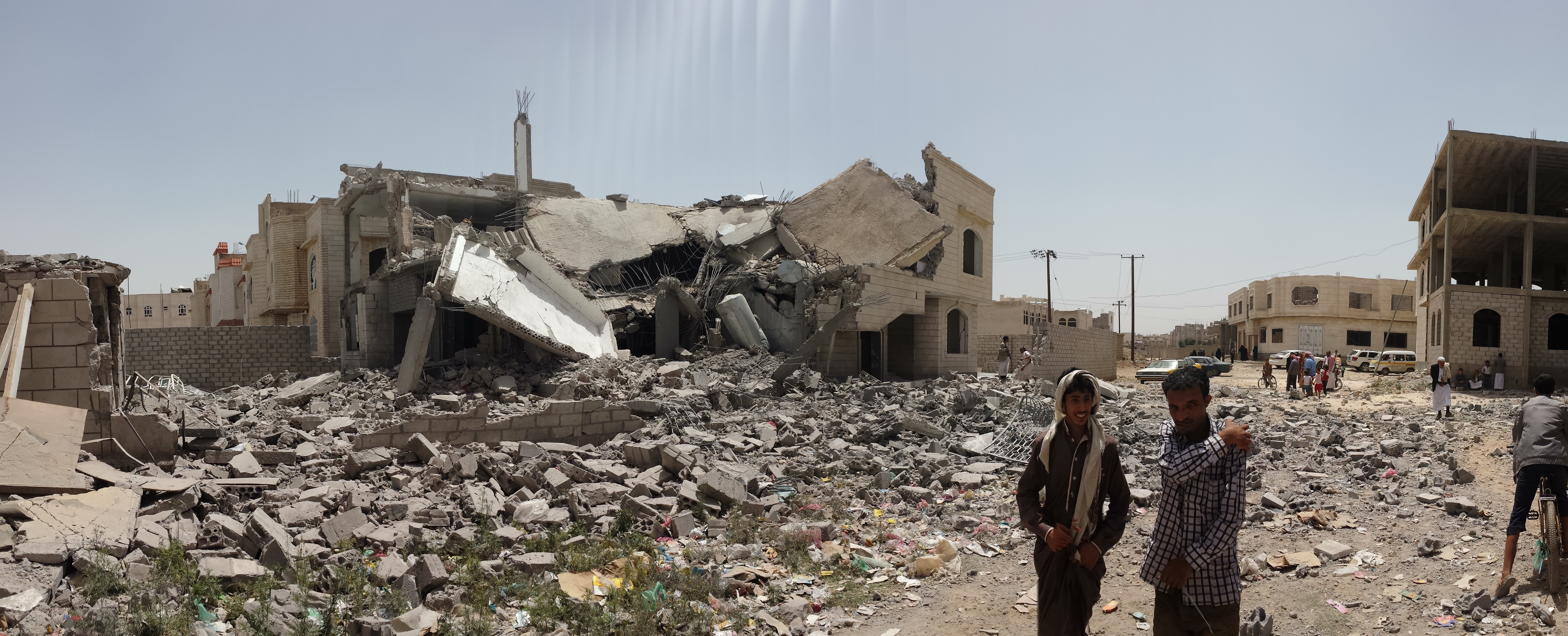 منزل مدمر نتيجة لغارات التحالف بقيادة السعودية - جنوب صنعاء